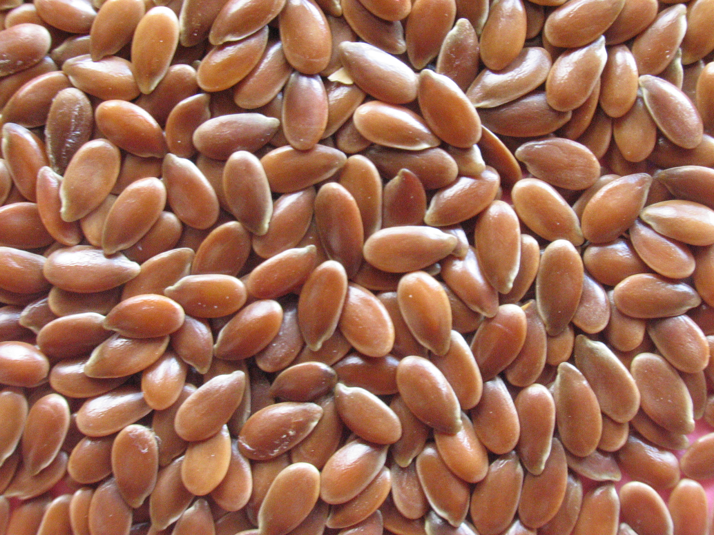 Graines de lin